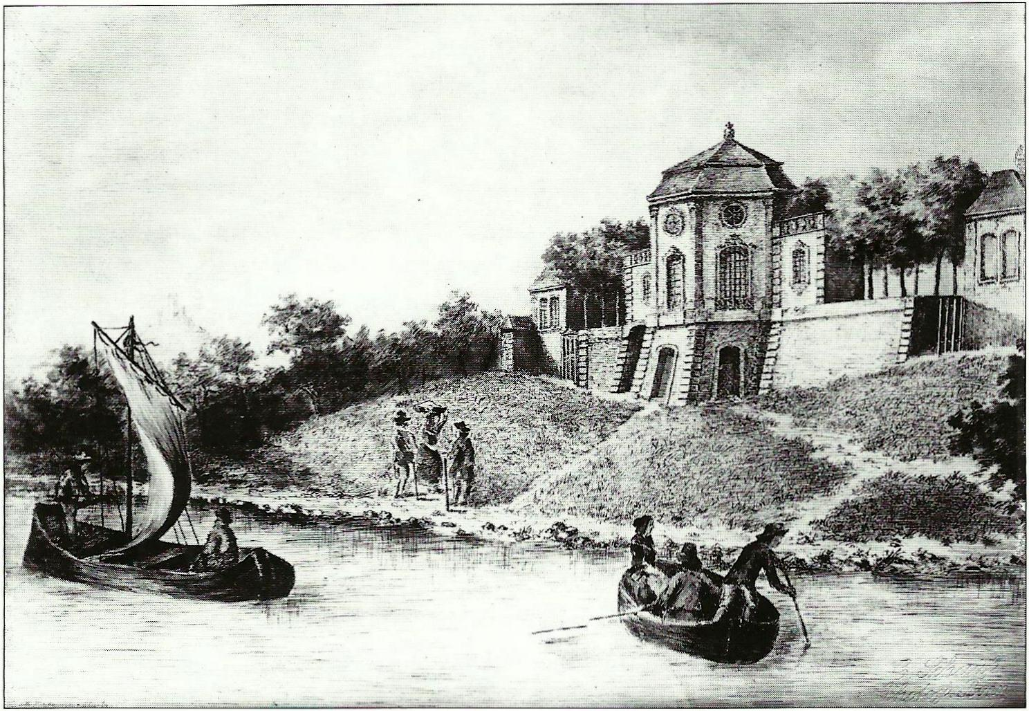 Vinea Domini, Bonn: Photographie einer Zeichnung